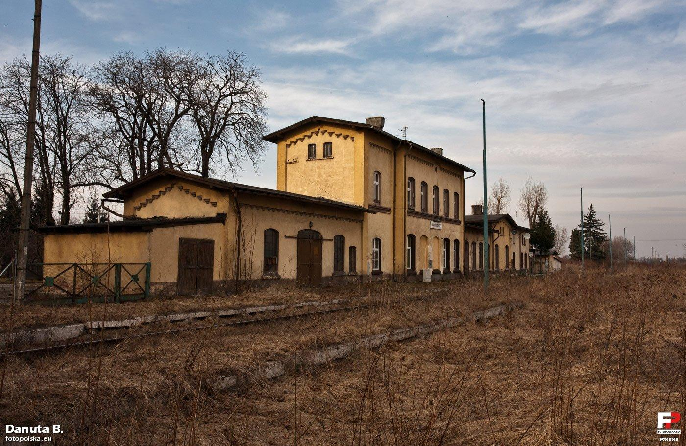 Dawny dworzec od strony torów. Pierwotna elewacja z cegły klinkierowej została kiedyś otynkowana, w pełnej krasie tu .